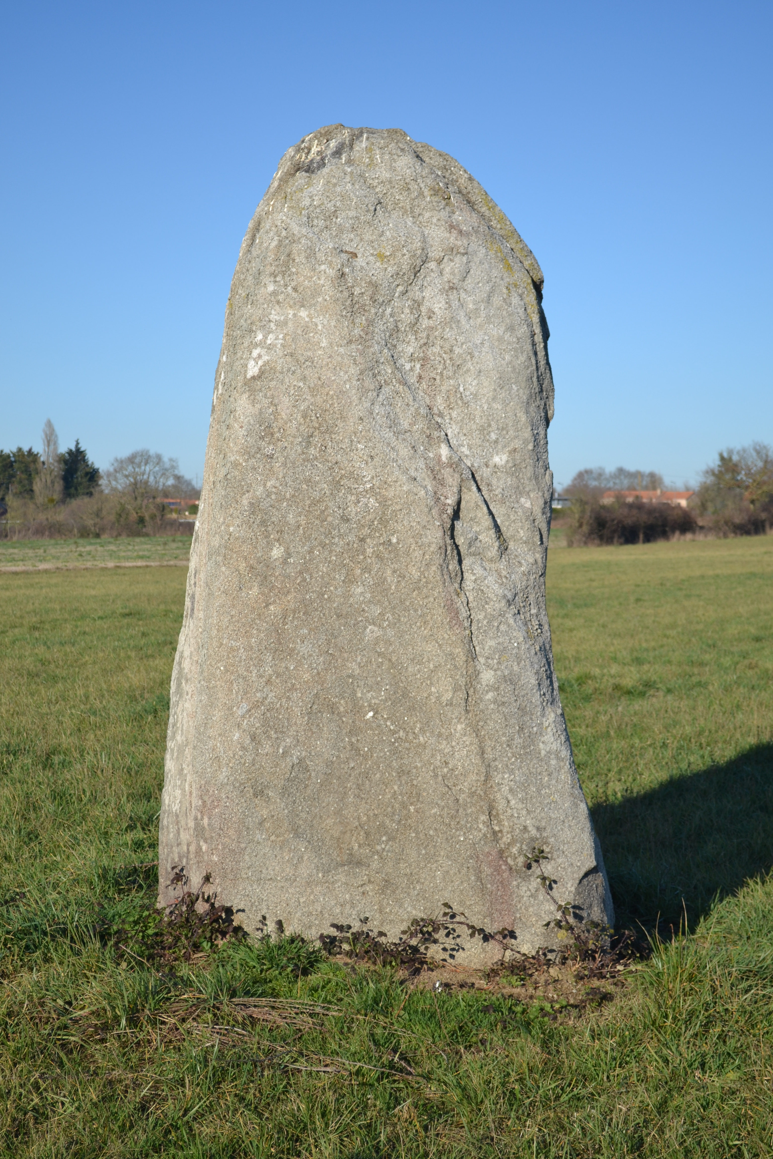 Petit menhir du Champ de la Garde, Cholet (49).